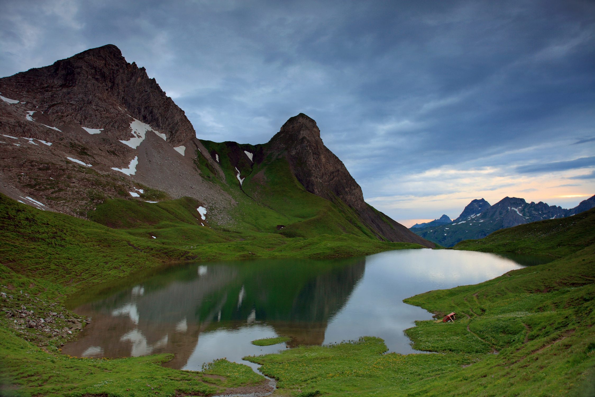 Der Rappensee in den Allgäuer Alpen